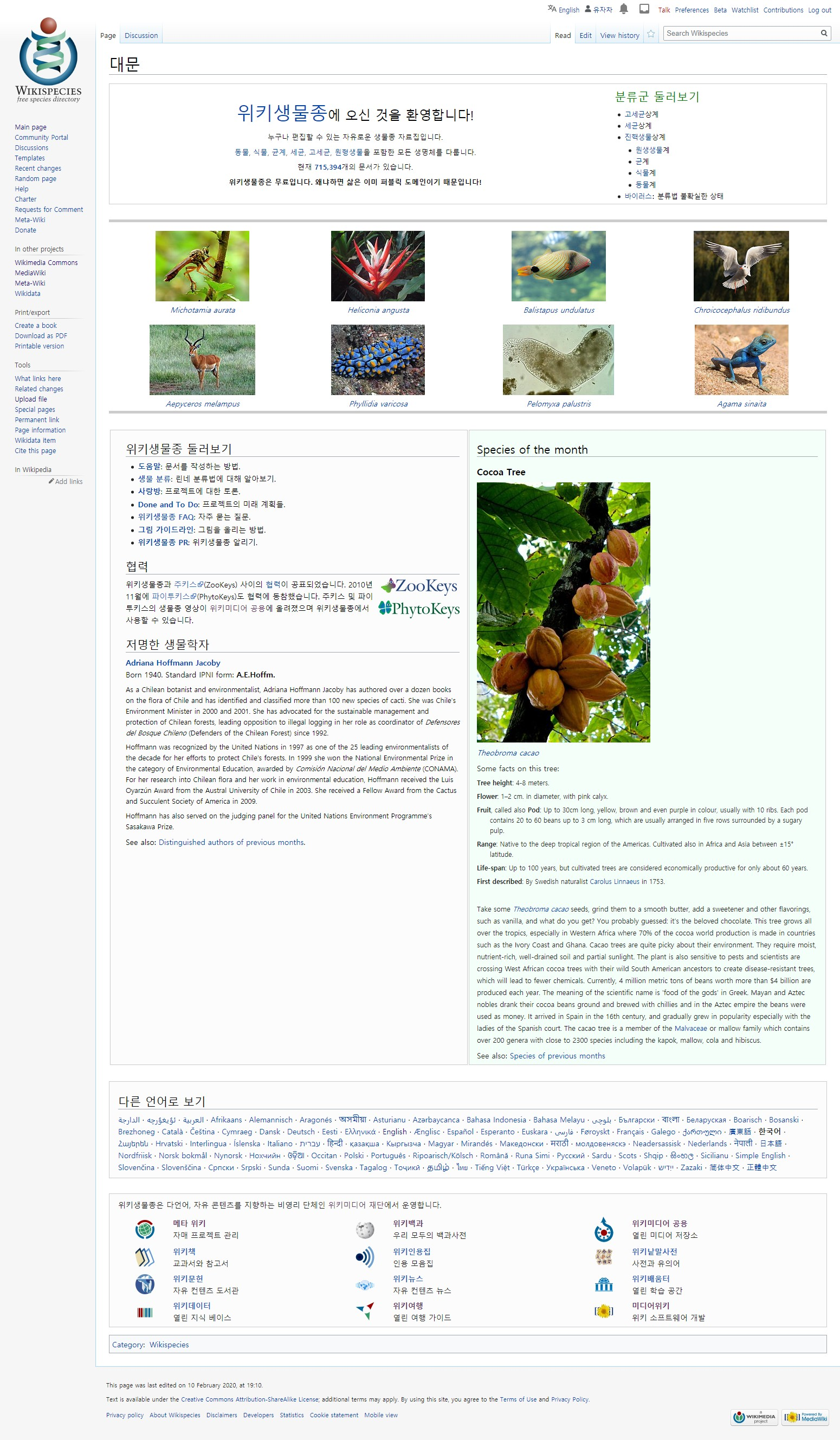 위키생물종 한국어 대문 스크린샷